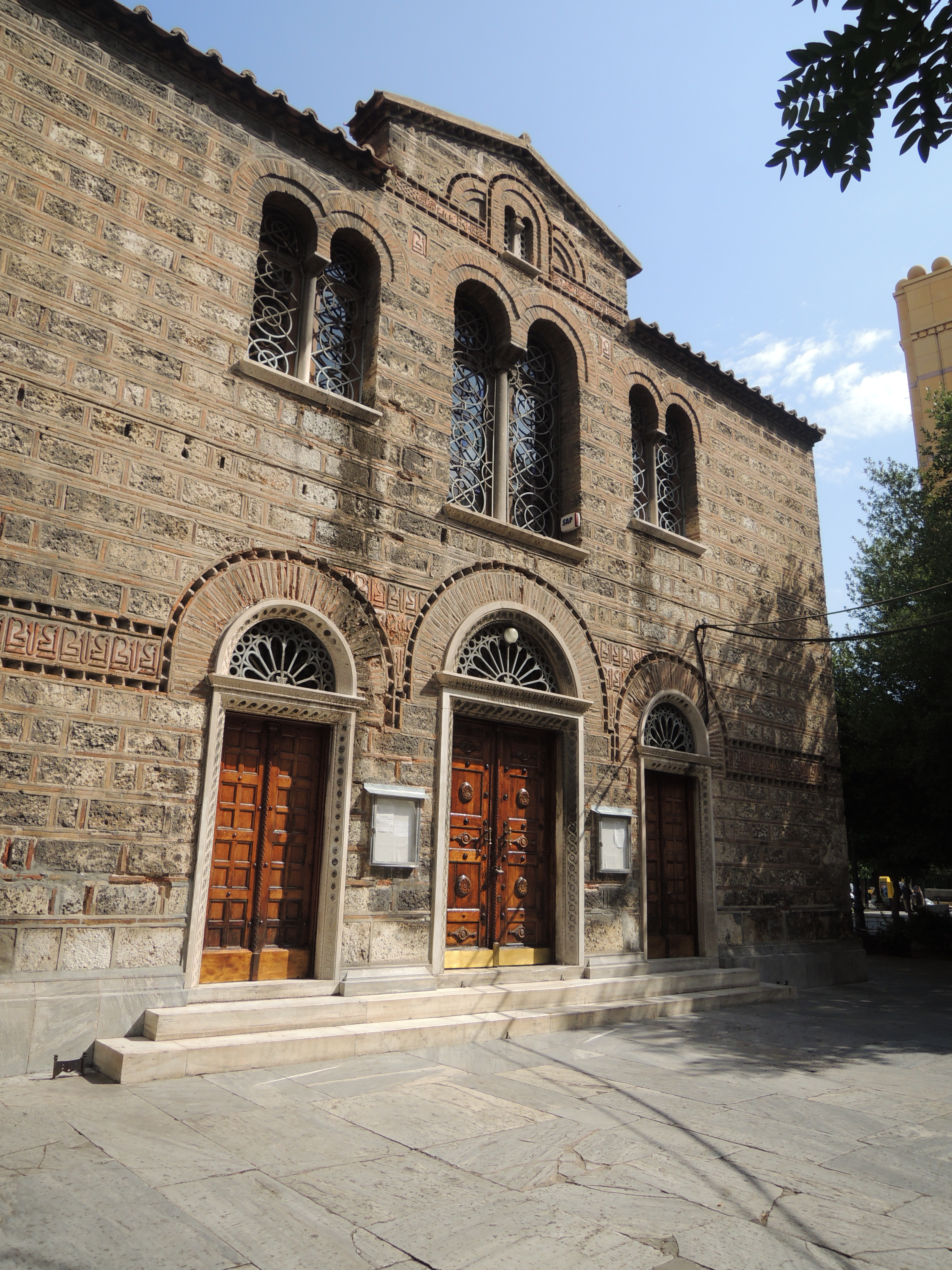 Русская посольская церковь (Афины)